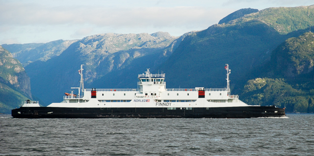 Finnøy i rute Oanes - Lauvik 2012